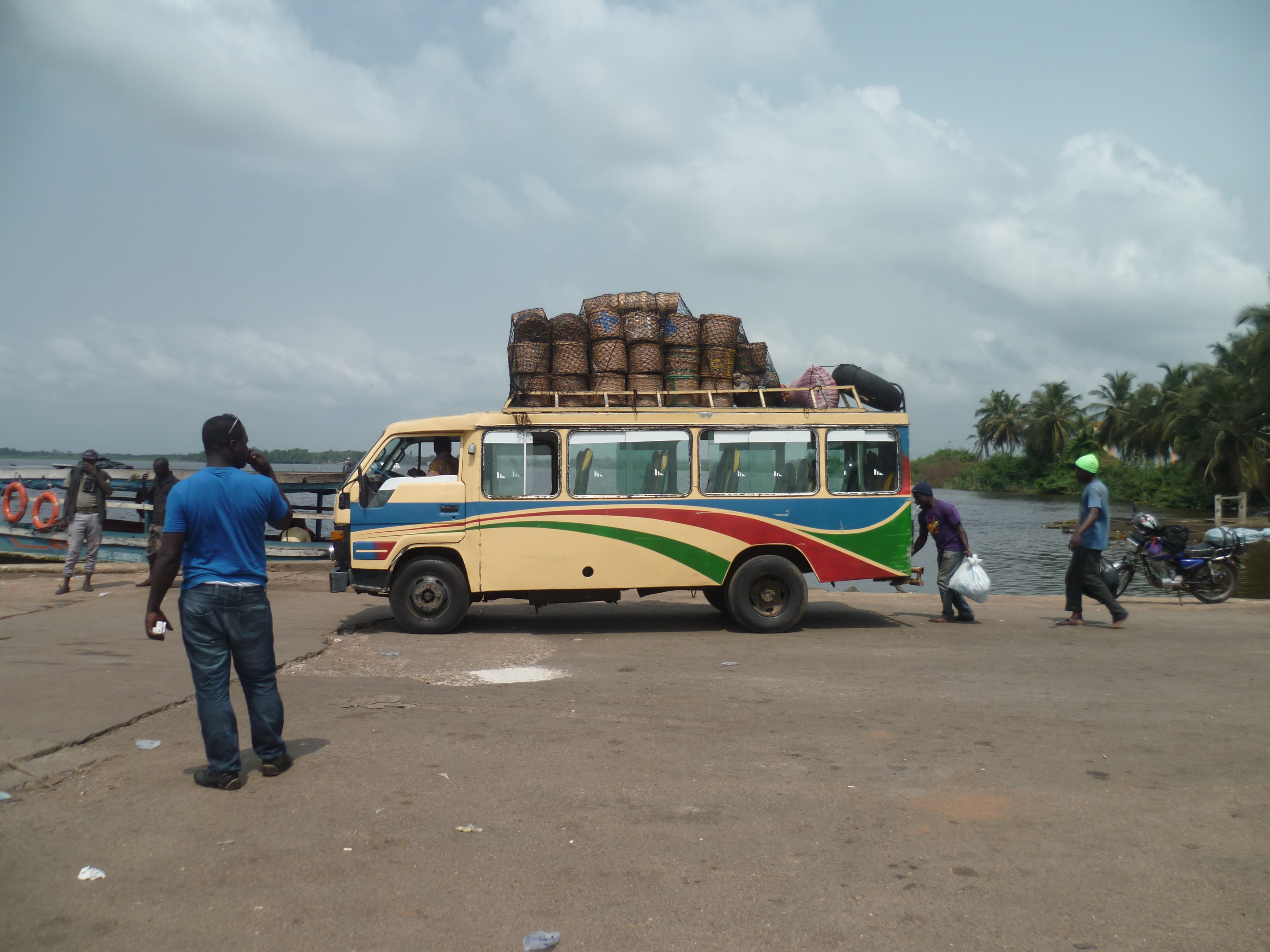 CI - N'dyéni - Lagune Ebrié - Mini Bus chargé de paniers, en attente de prendre le bac (depuis il existe un pont, qui était en construction) This is an image with the theme "Africa on the Move or Transport" from: Ivory Coast